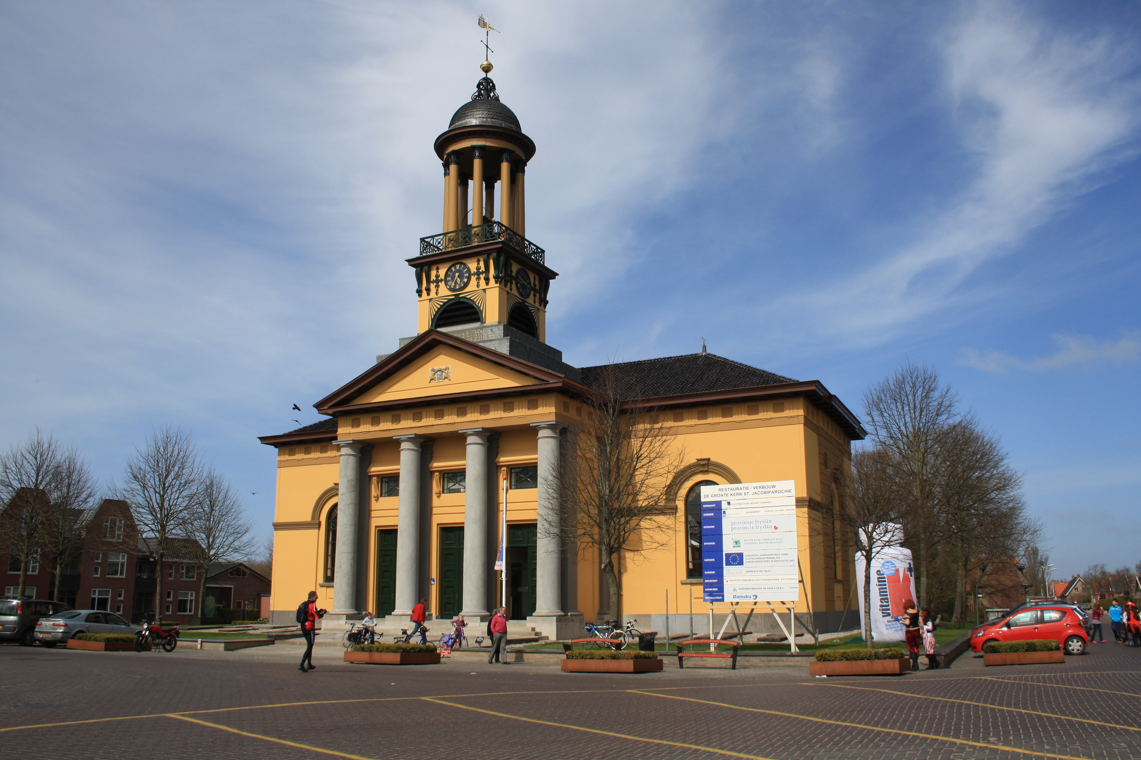 Groate Kerk, NH kerk in Sint Jacobiparochie (Rijksmonument 9511)